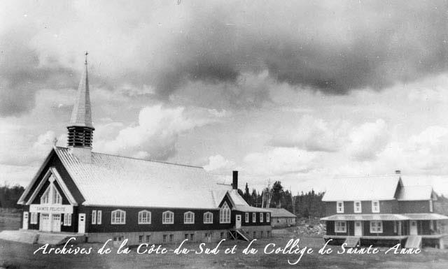 Photographie prise en 1948.